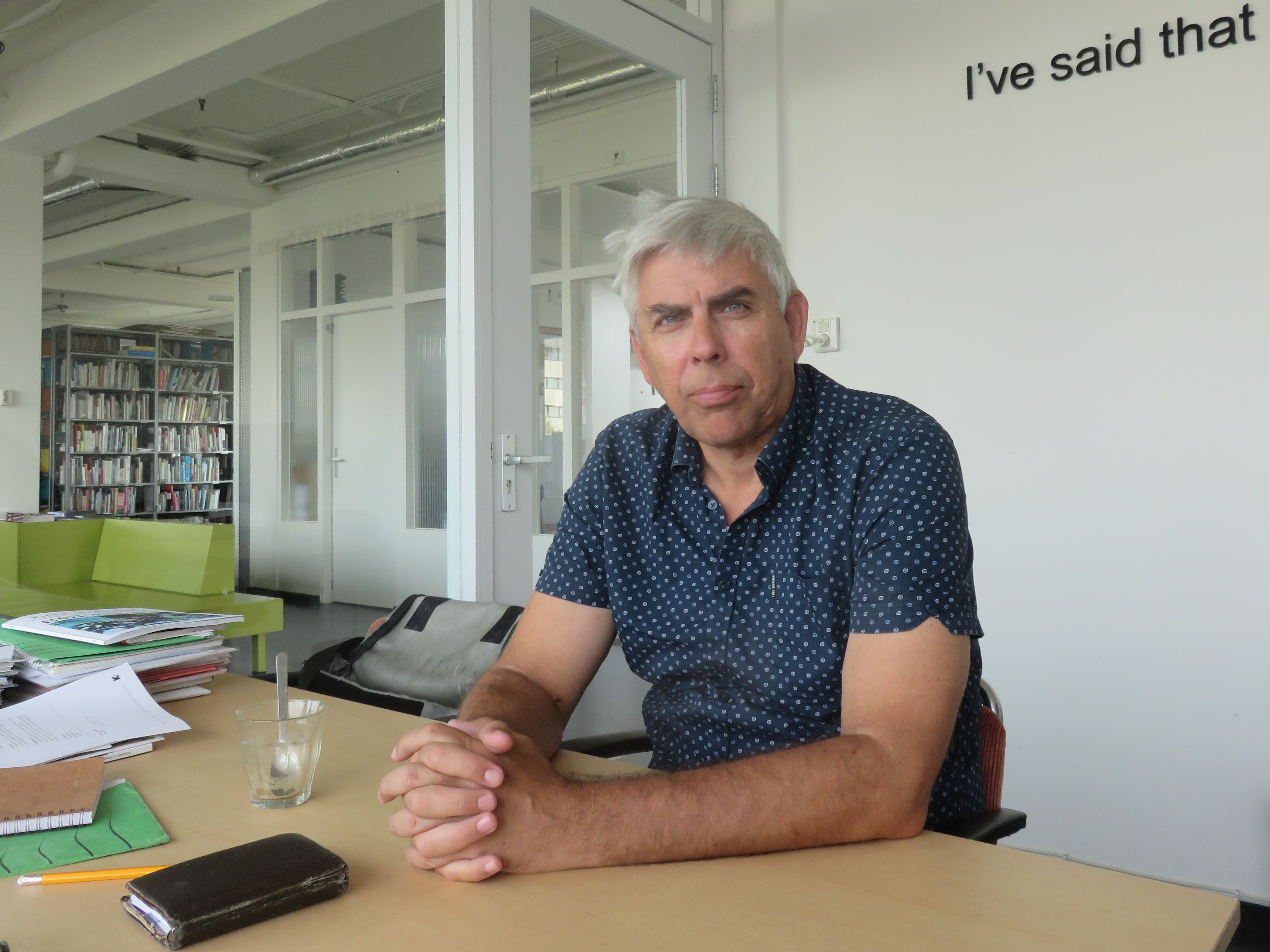 Ove Lucas in Centrum Beeldende Kunst Rotterdam, 2018